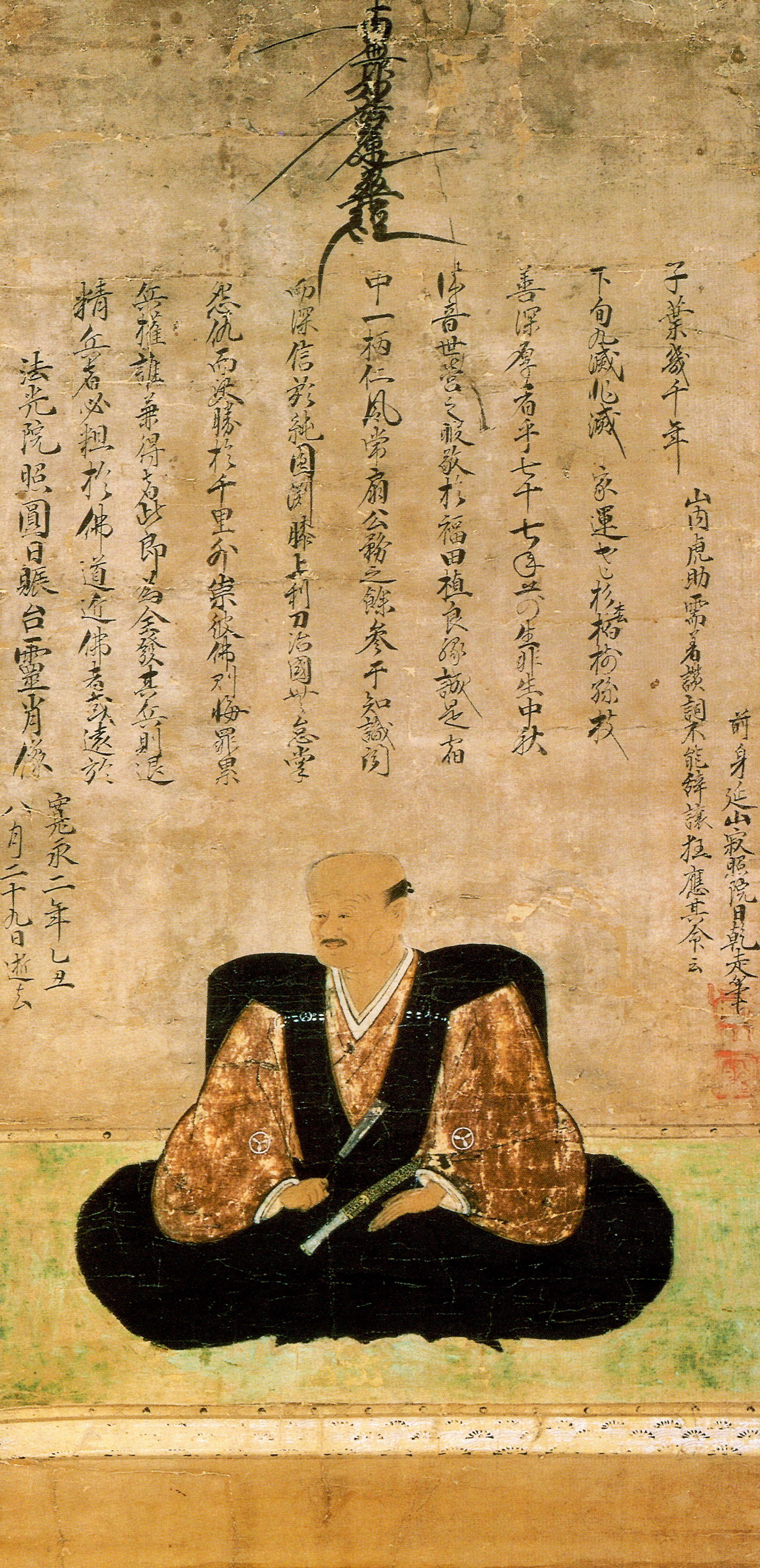 山内康豊の肖像。